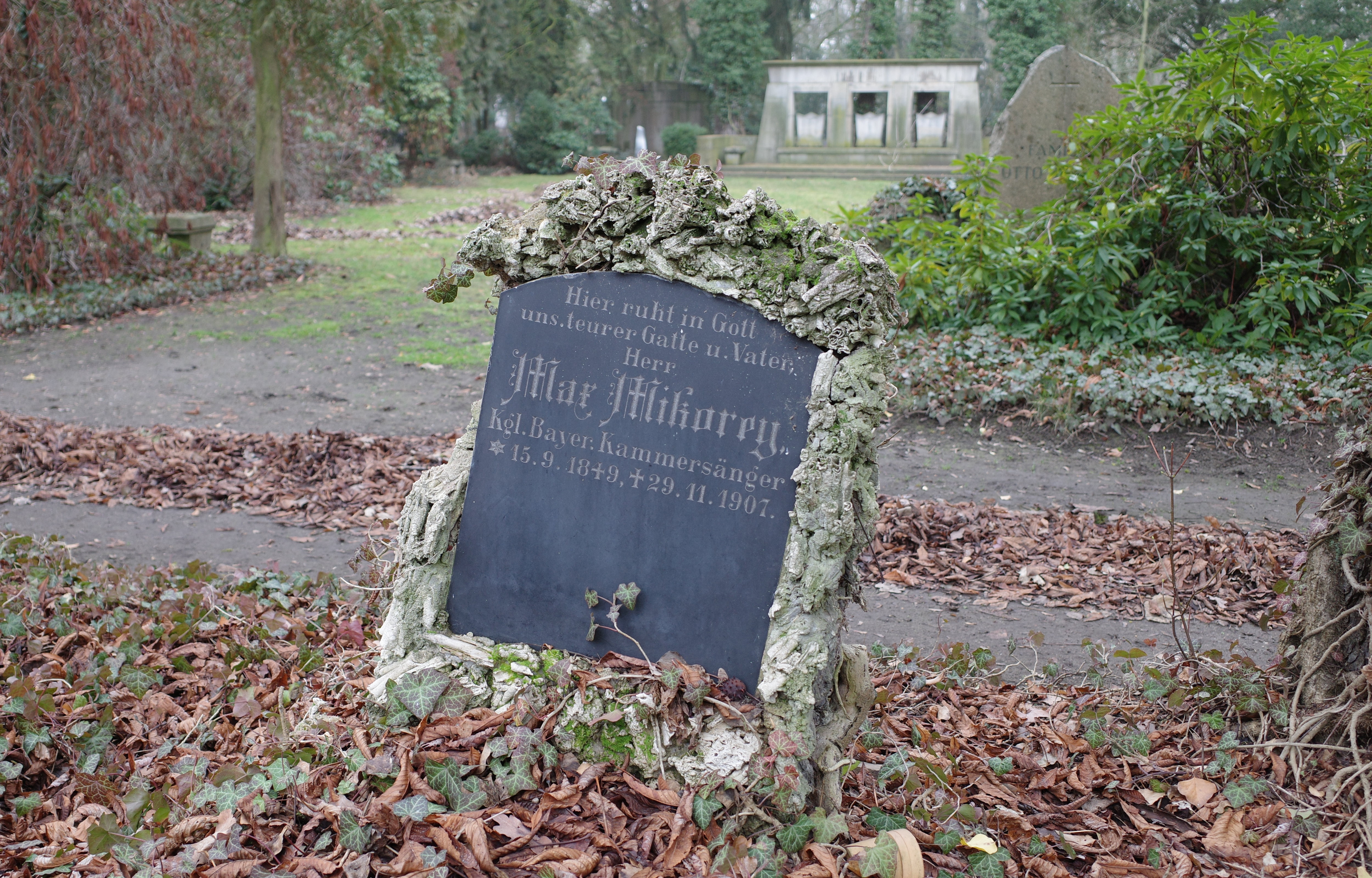 Max Mikorey (Opernsänger), Grabmahl auf dem Friedhof 3 in Dessau.